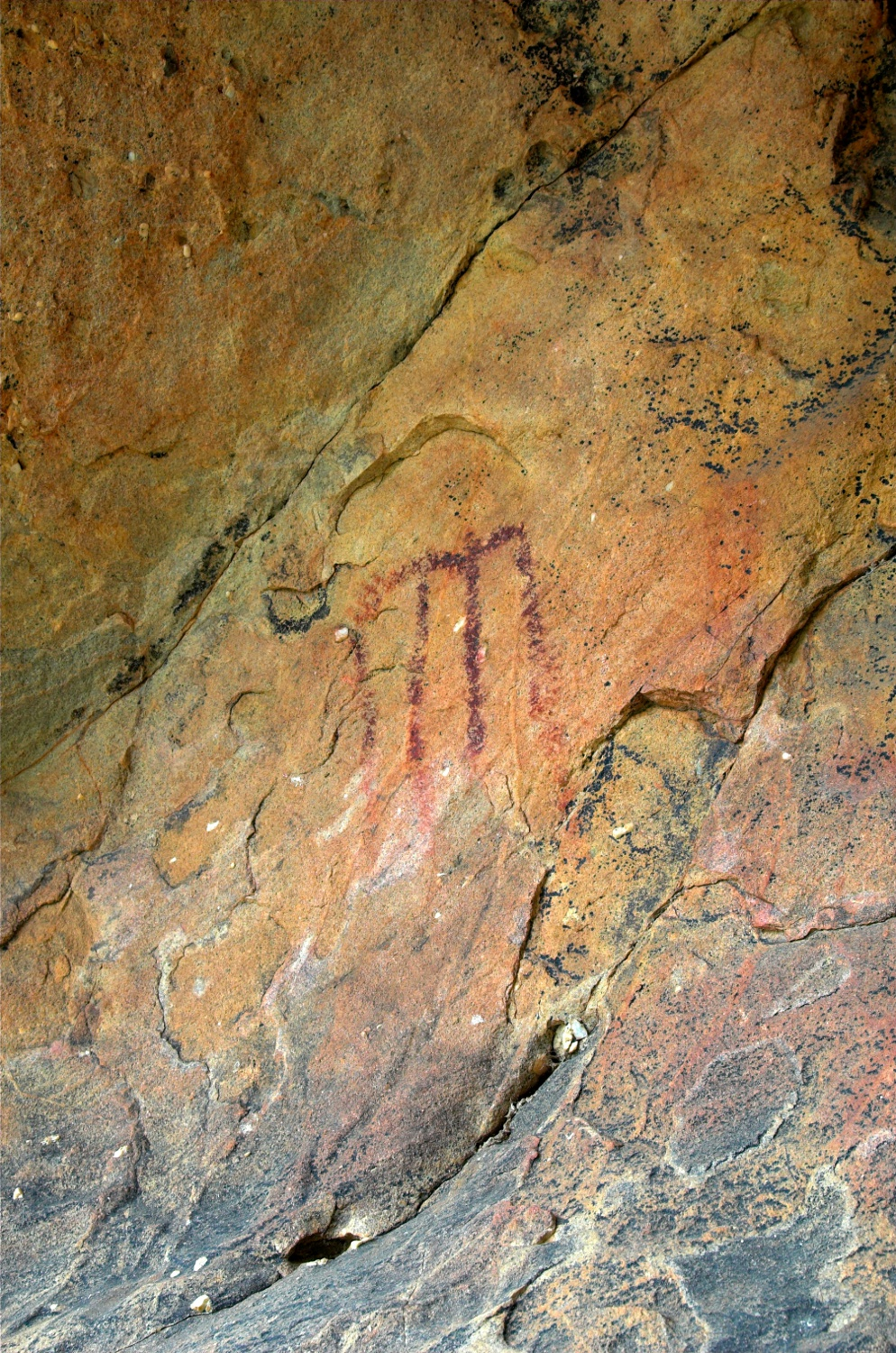 Pinturas rupestres de las Piedras de Cabrera (Casabermeja).